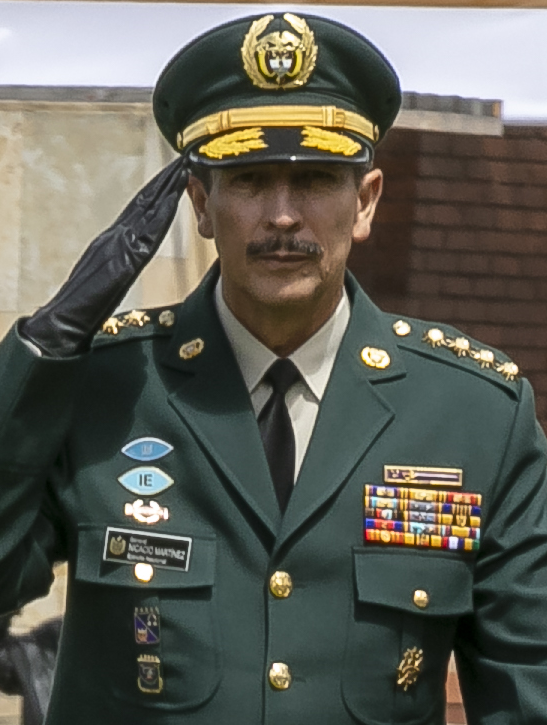 General Nicacio de Jesús Martínez Espinel, Comandante del Ejército Nacional de Colombia